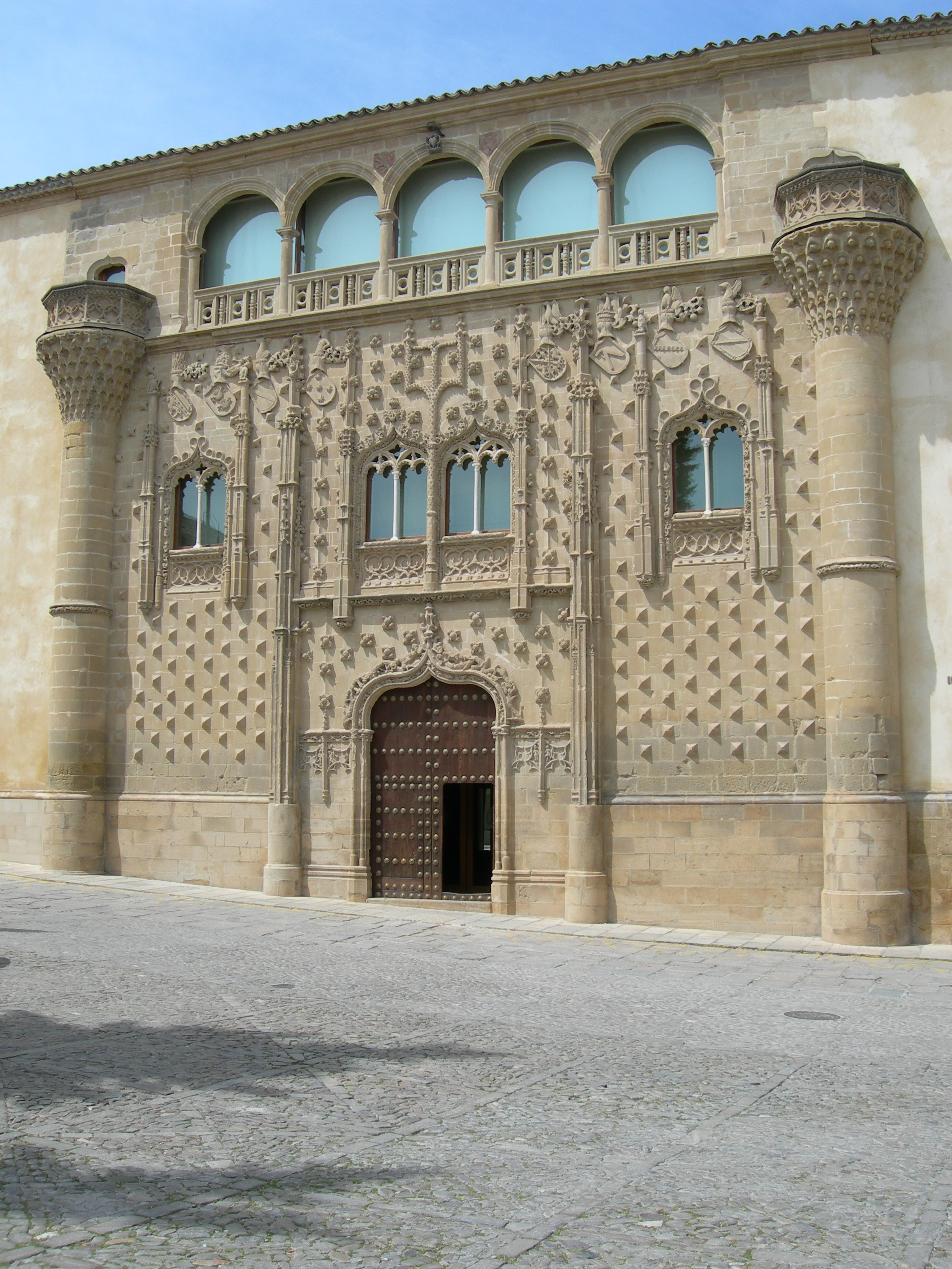 Fachada del Palacio de Jabalquinto en Baeza